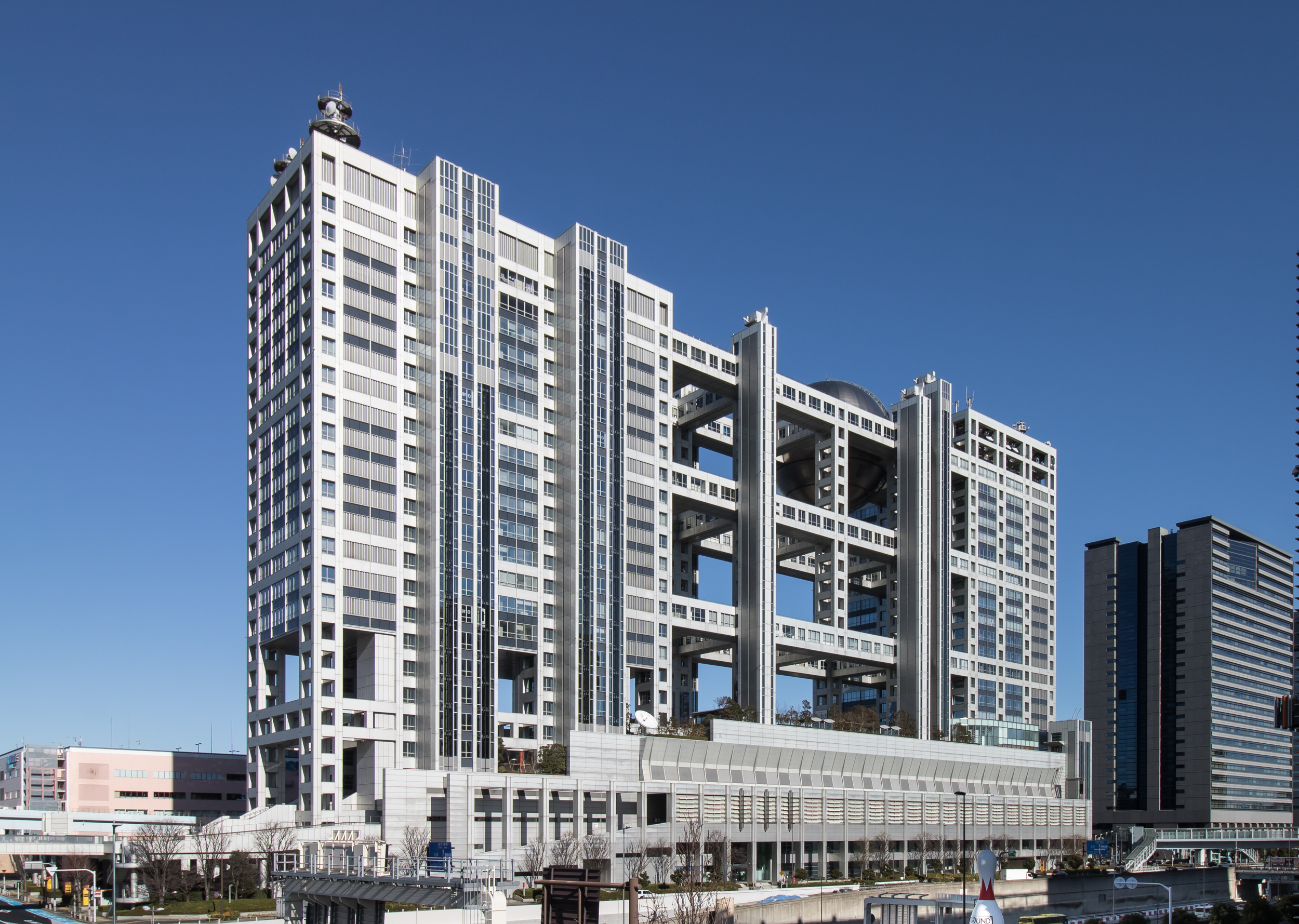 FCGビル.丹下健三設計